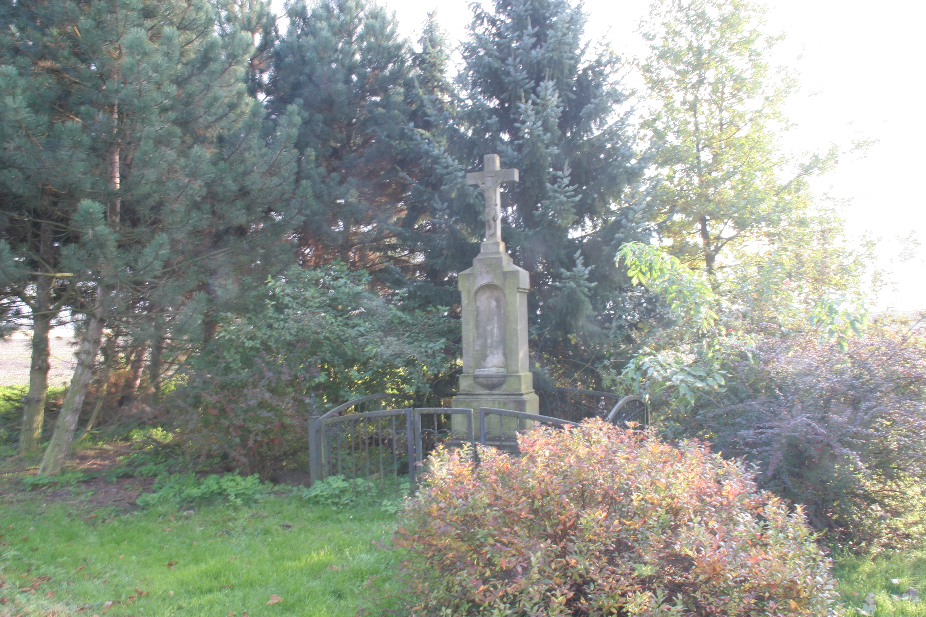 Žíka kříž